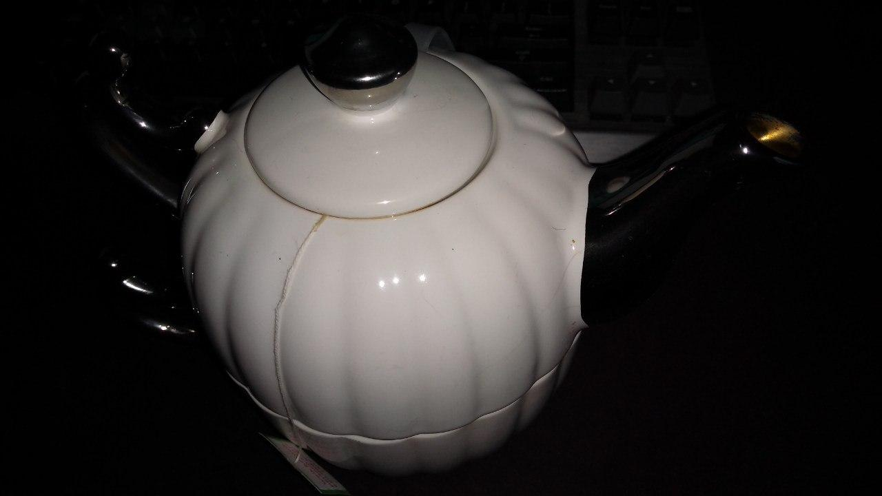 Een theepotje met cannabisthee